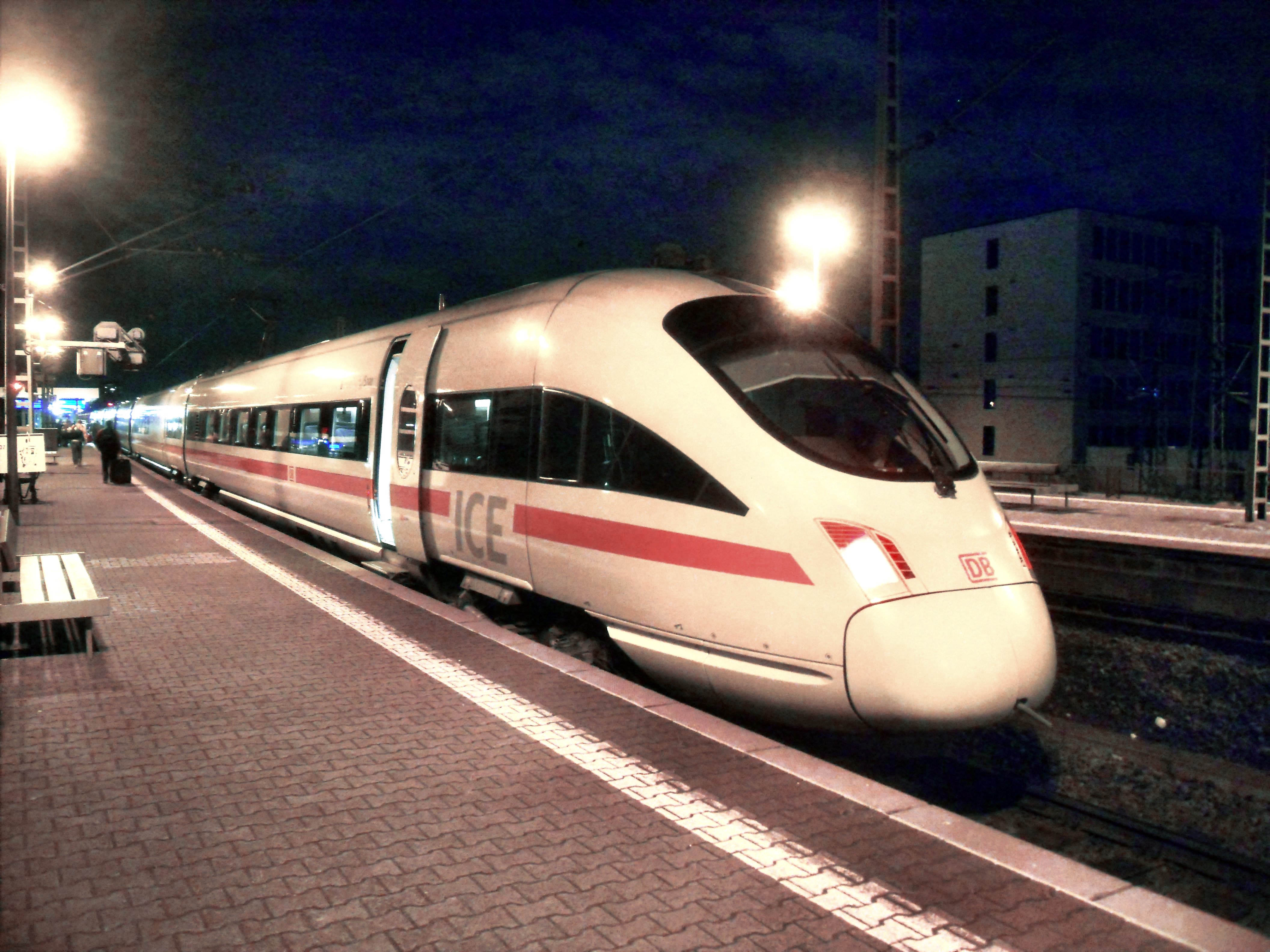 ICE T im Bahnhof Frankfurt (Main) Süd auf dem Weg zum Frankfurt (Main) Flughafen Fernbahnhof in Hessen (Deutschland). ICE 415 021-5 (Tz 1521) Homburg (Saar) vom Bahnsteig zu Gleis 7 aus fotografiert.